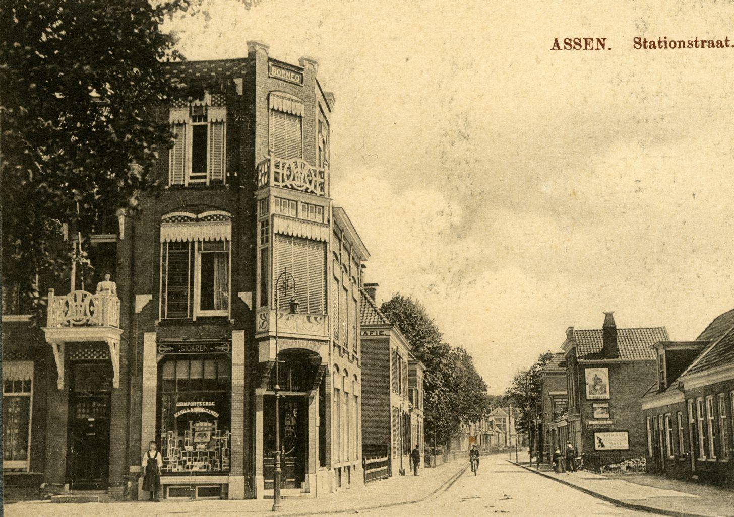 Zicht op de Stationsstraat in Assen medio 1910, links de sigarenwinkel Borneo.